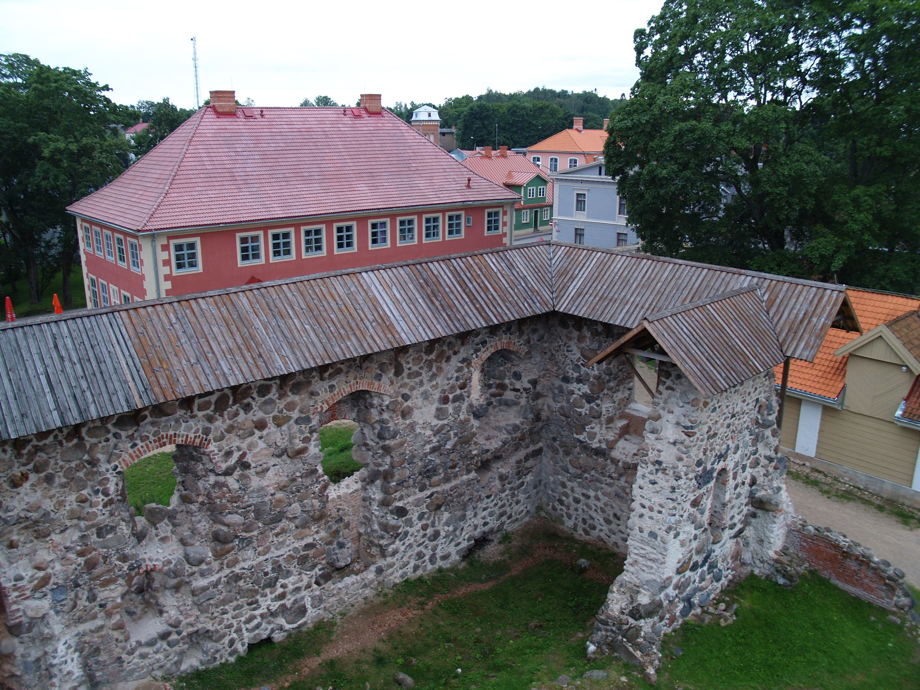 Lemsalu piiskopilinnus vaatetornist